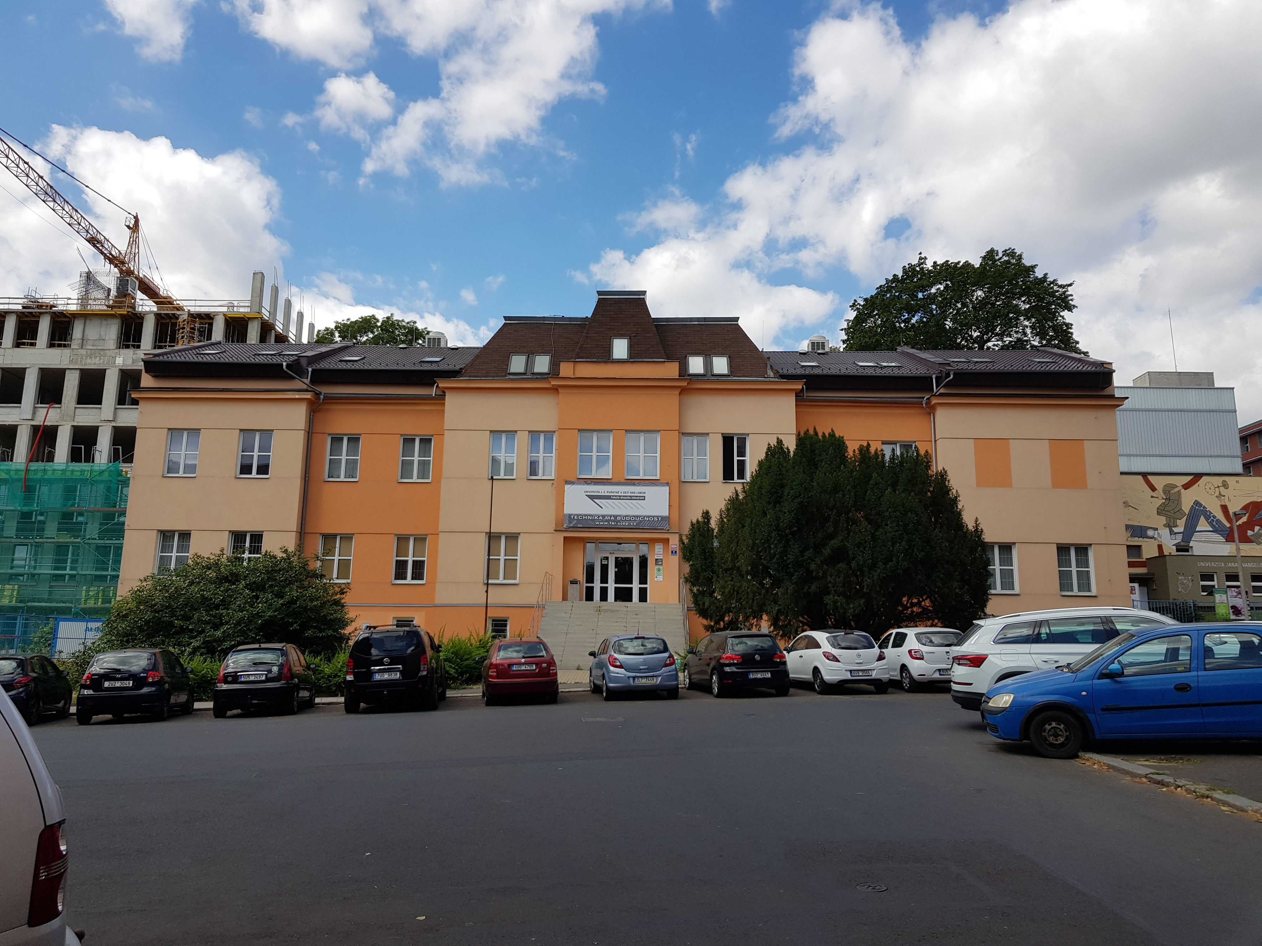 Budova Ústavu technologií a materiálů, Pasteurova 3334/7, Ústí nad Labem-město, Ústí nad Labem-centrum.